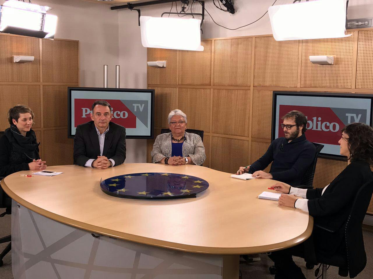 Imelda Daza, integrante de Voces de Paz y Reconciliación